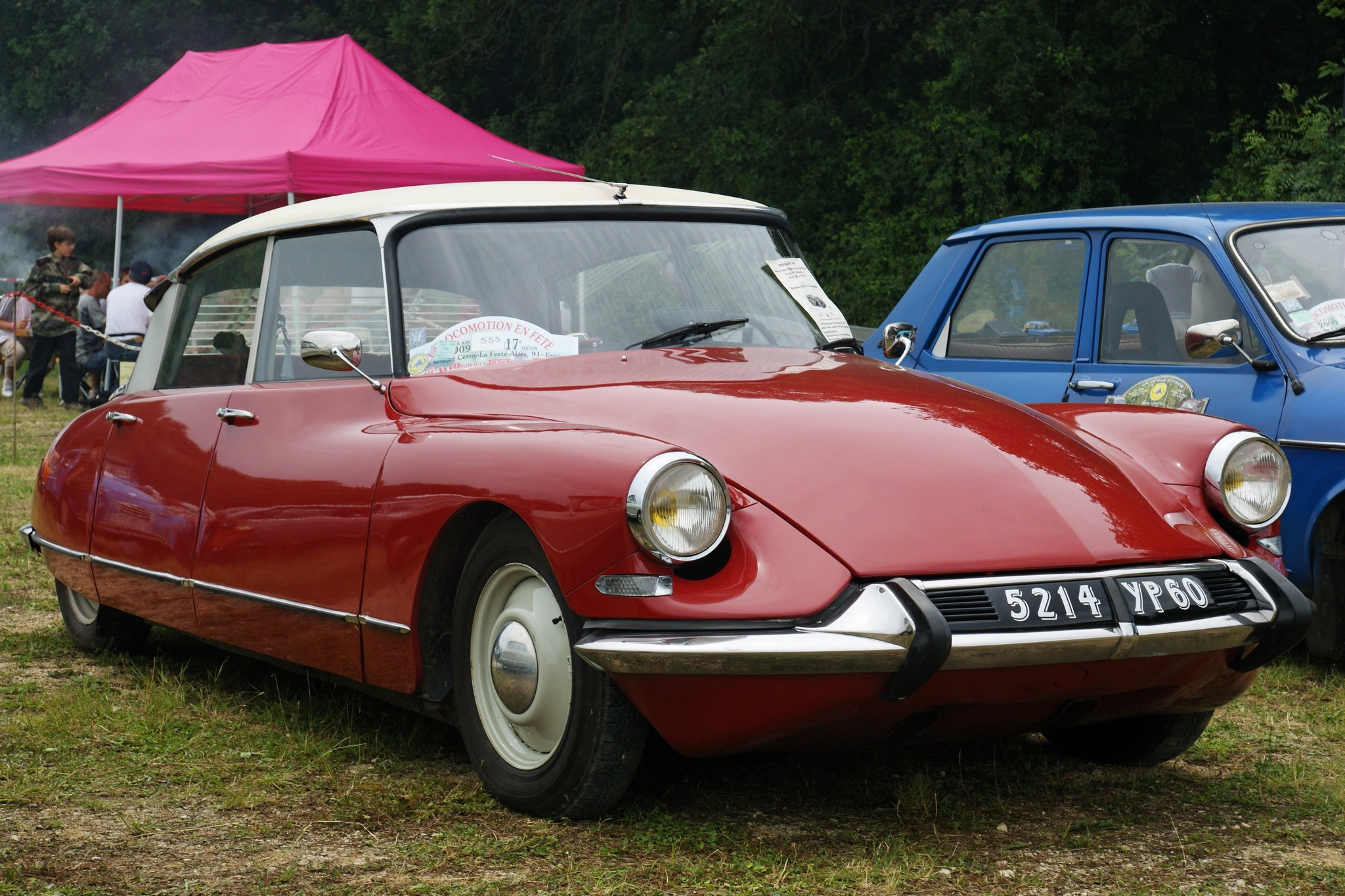 Vue de devant d'une ID